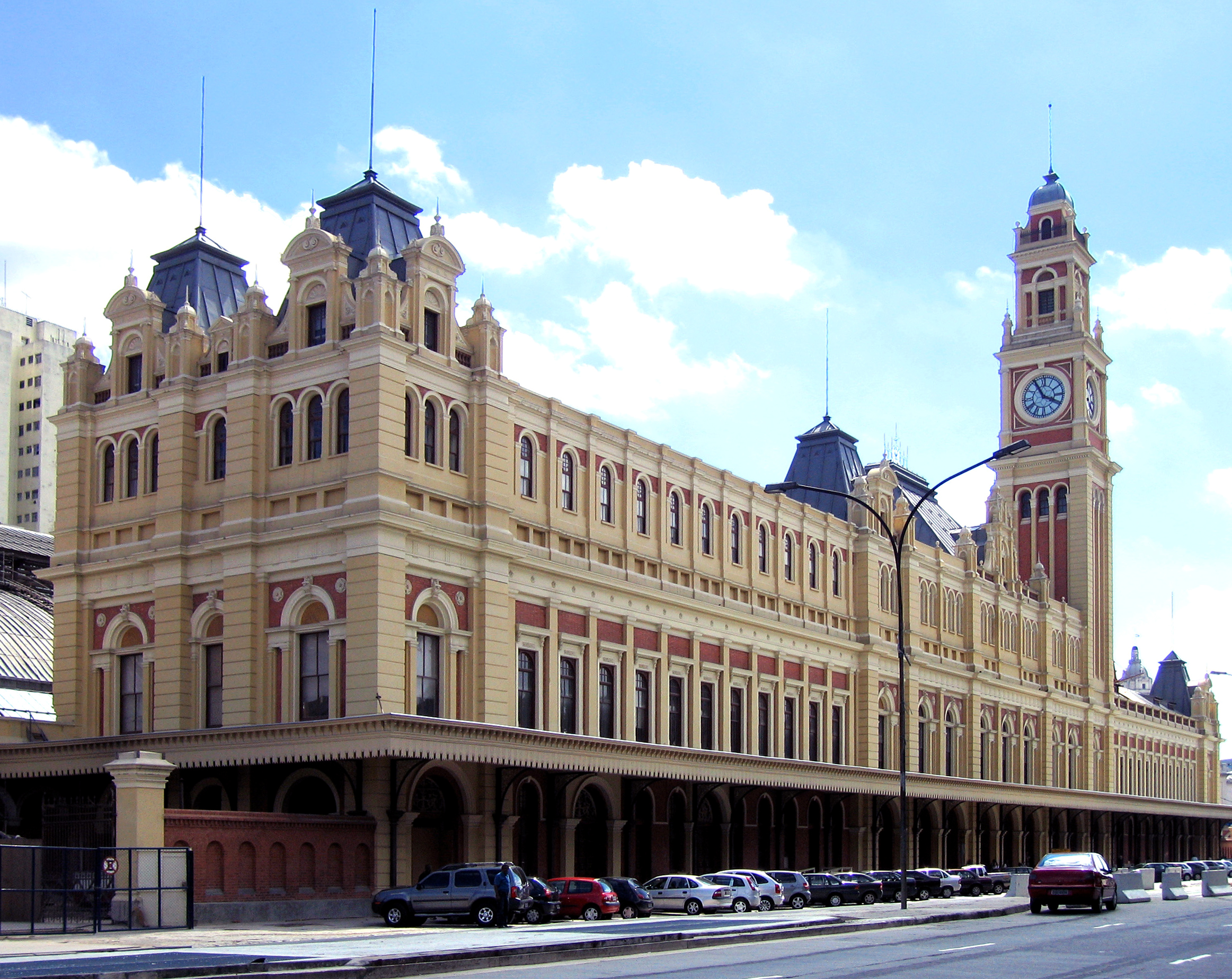 Estação da Luz, em São Paulo, no Brasil